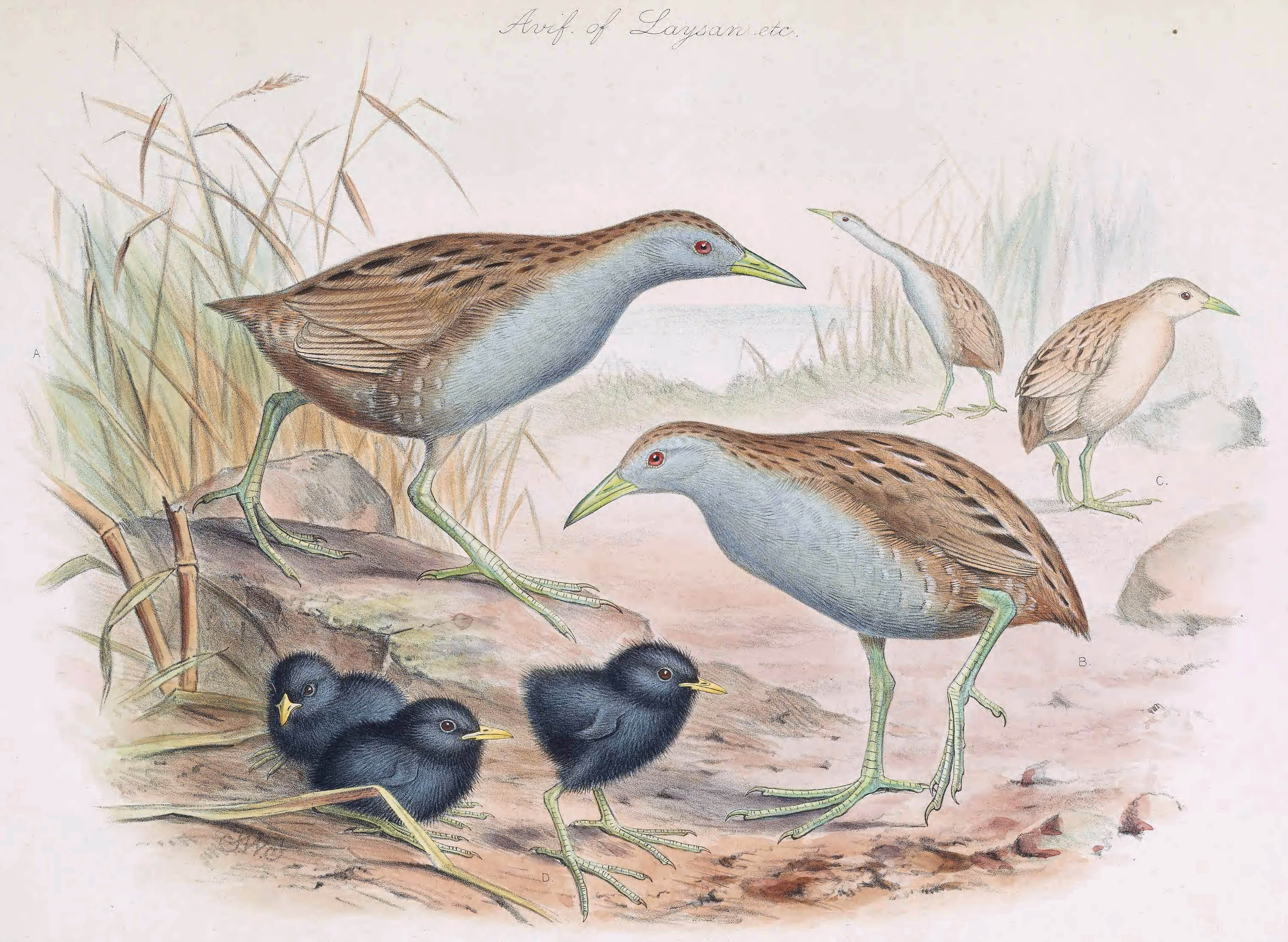 Laysanralle (Porzana palmeri).